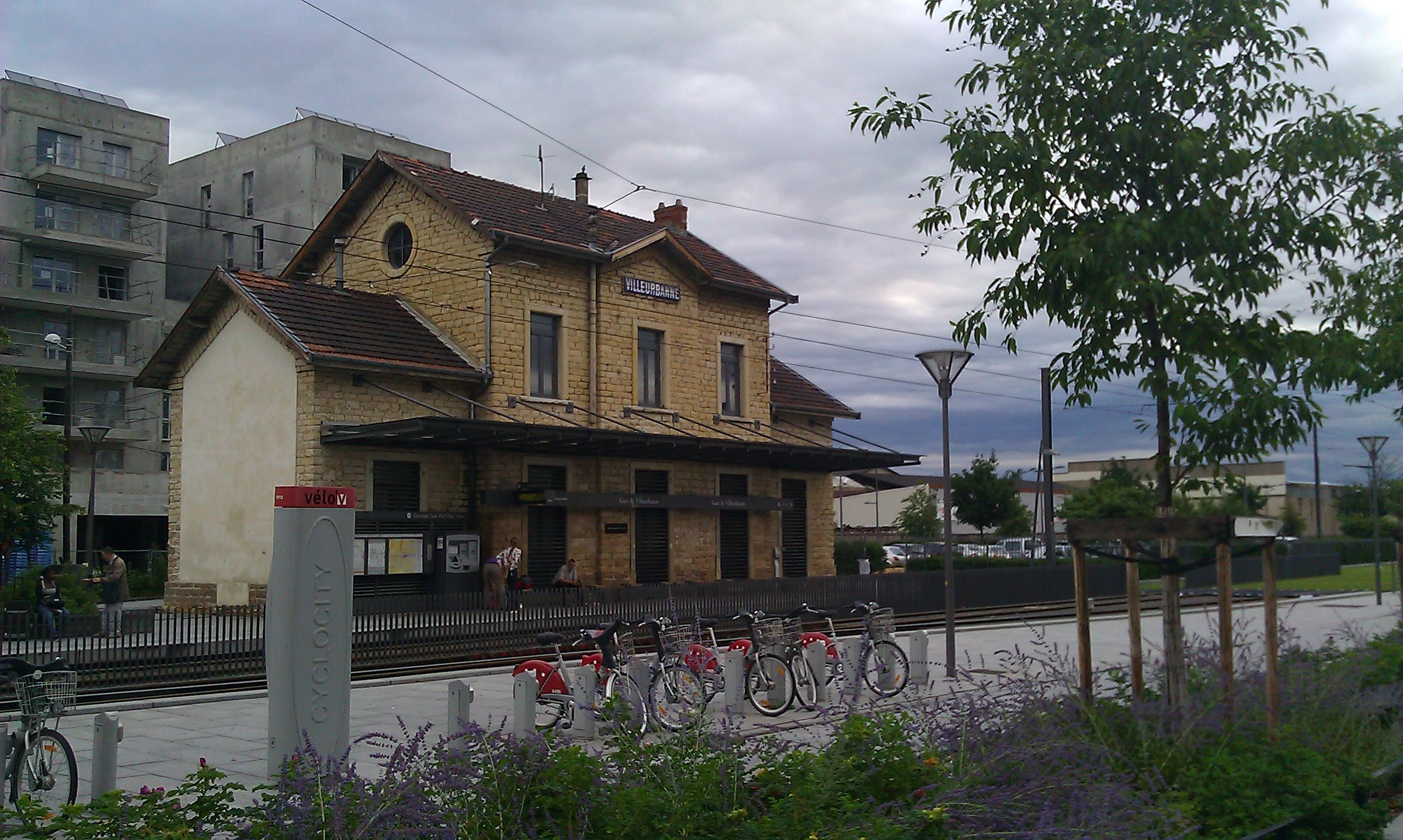 Vue de la gare de Villeurbanne, ancienne gare du Chemin de Fer de l'Est Lyonnais (CFEL). Arrêt du tram T3 du réseau TCL. Station Vélo'v.